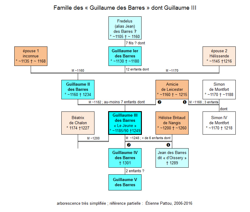 Arborescence de la famille de Guillaume III des Barres